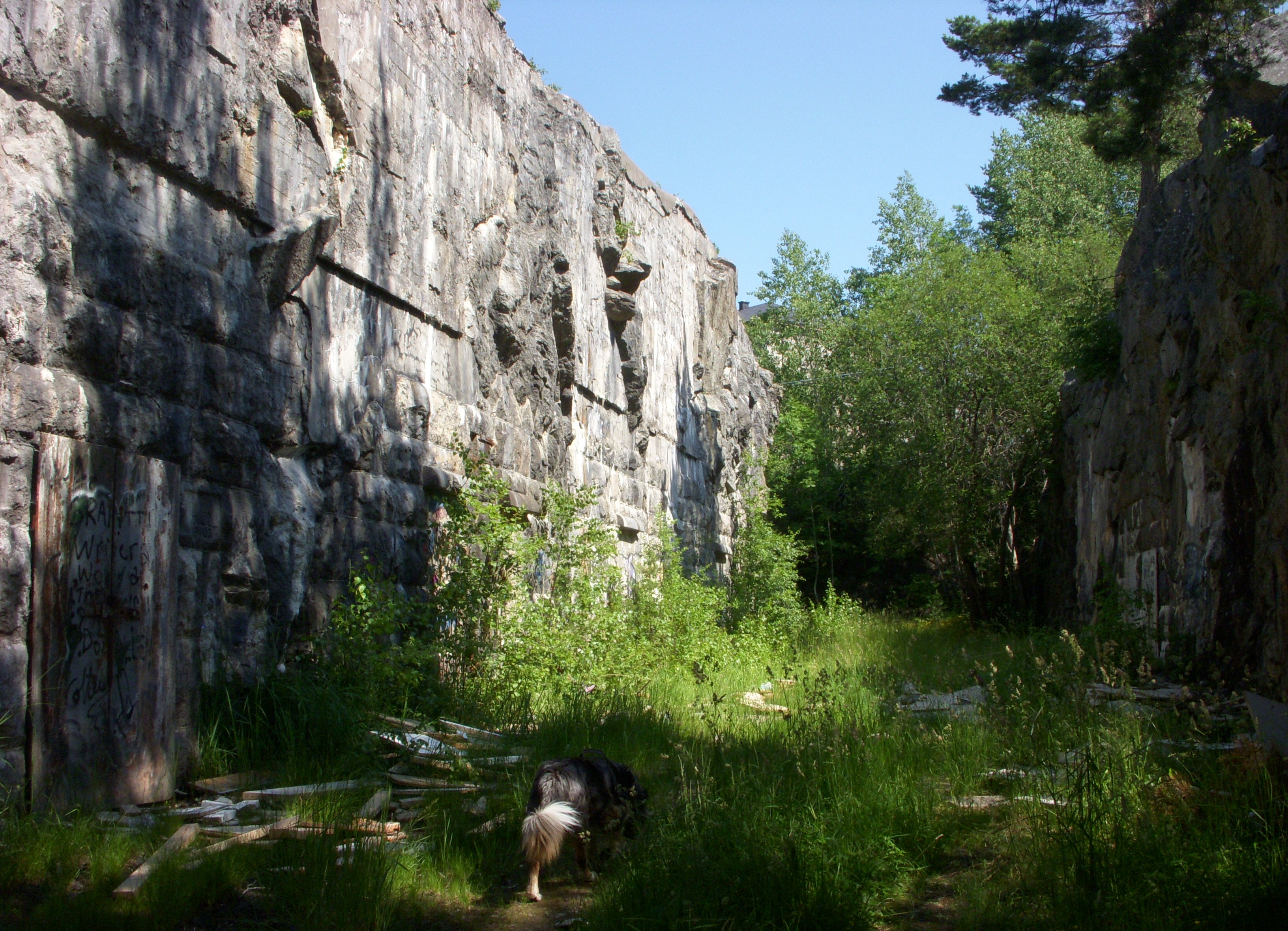 12:e batteriet på Rindö, tillhör Rindö redutt